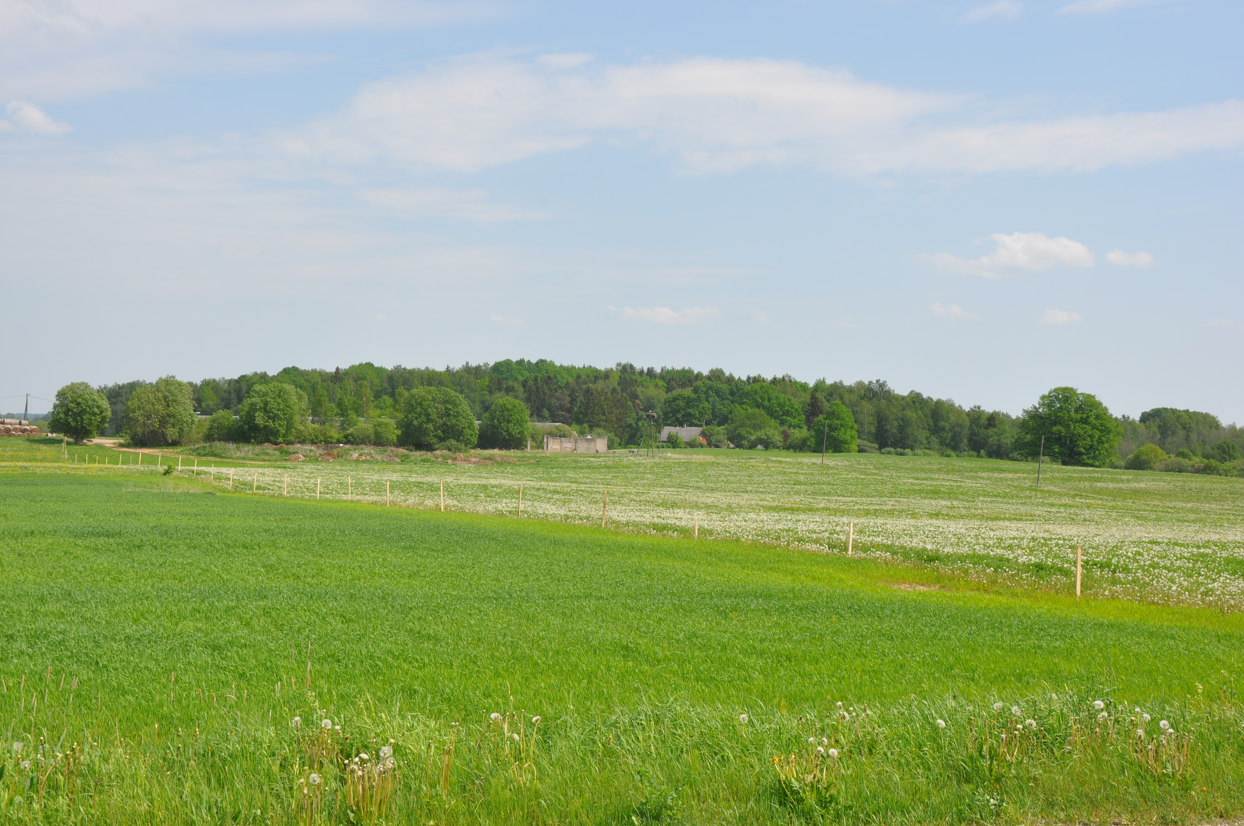 Baltā stārķa ligzda Nr.1159, Valdgales pagasts, Talsu novads, Latvia